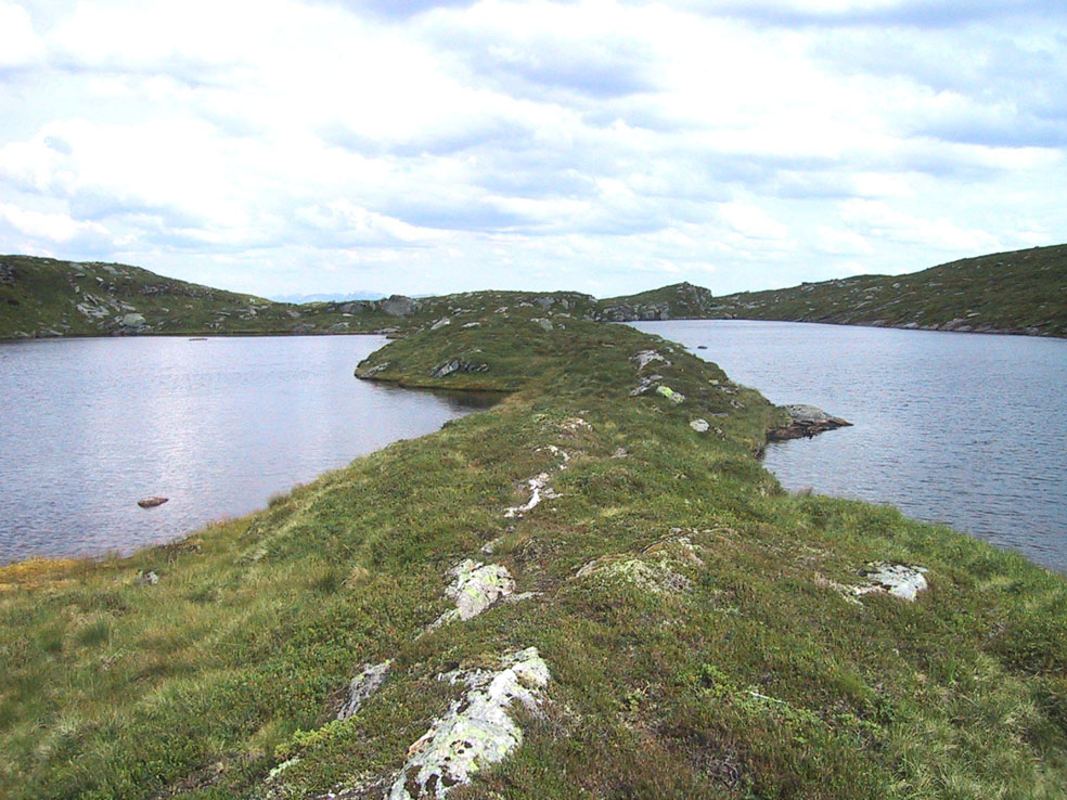 Lake Dyttingane